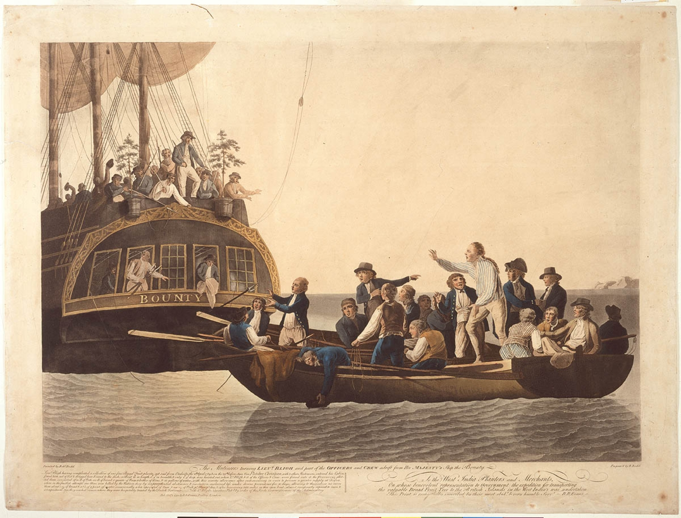 Bligh und die anderen verlassen die HMS Bounty und steigen in das Beiboot. Künstler: Robert Dodd, 1790